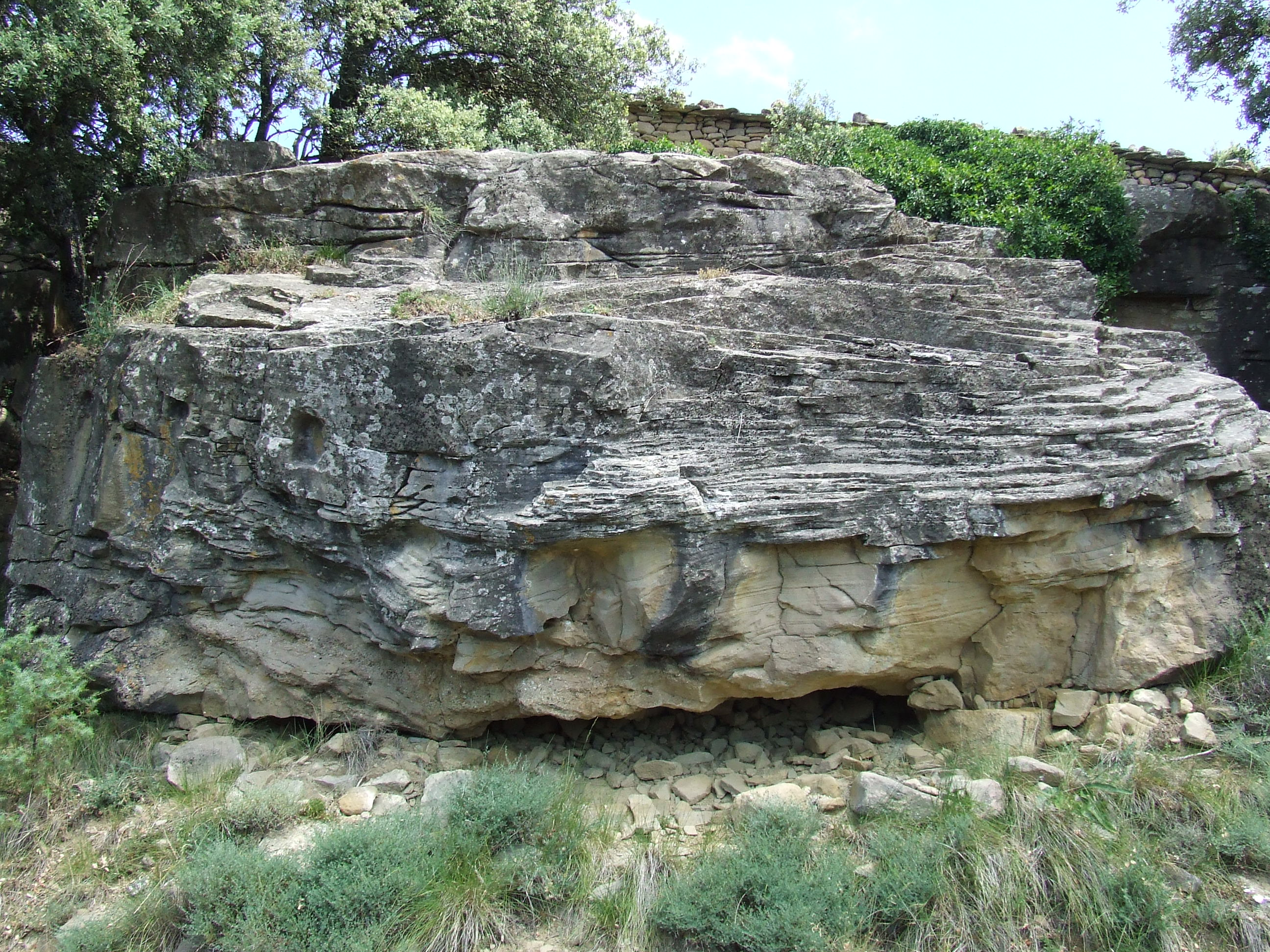 Una pedra molera (Vilamolera, Sant Esteve de la Sarga, Pallars Jussà)